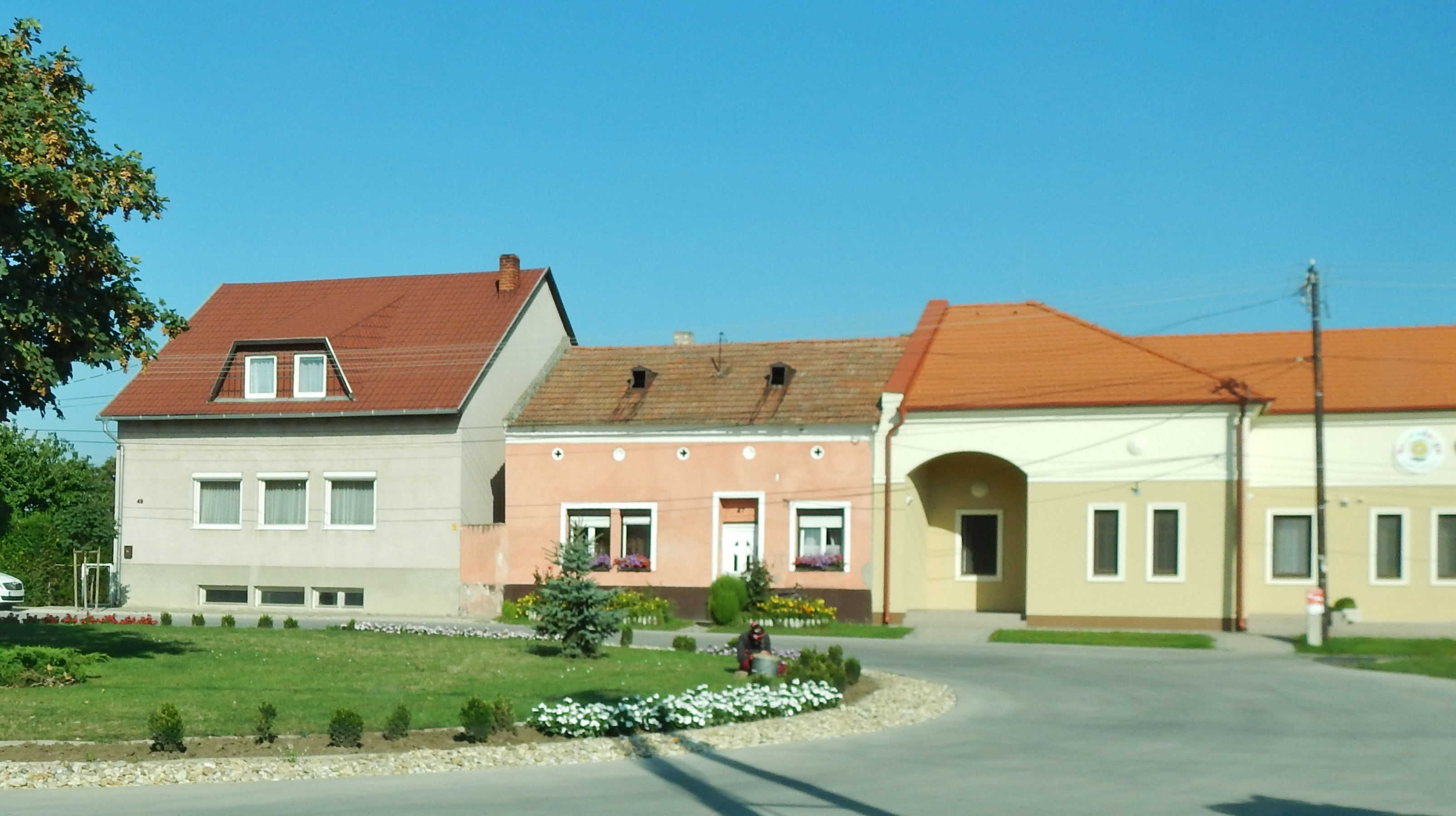 Mosonszolnok